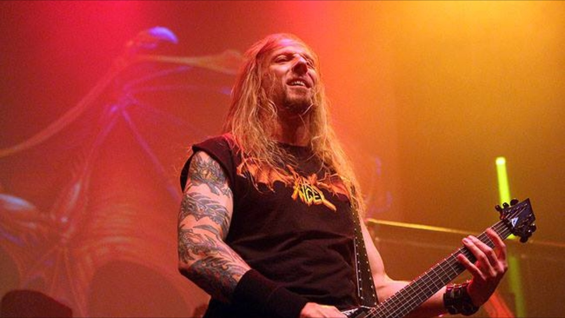 Dark Angel 2014